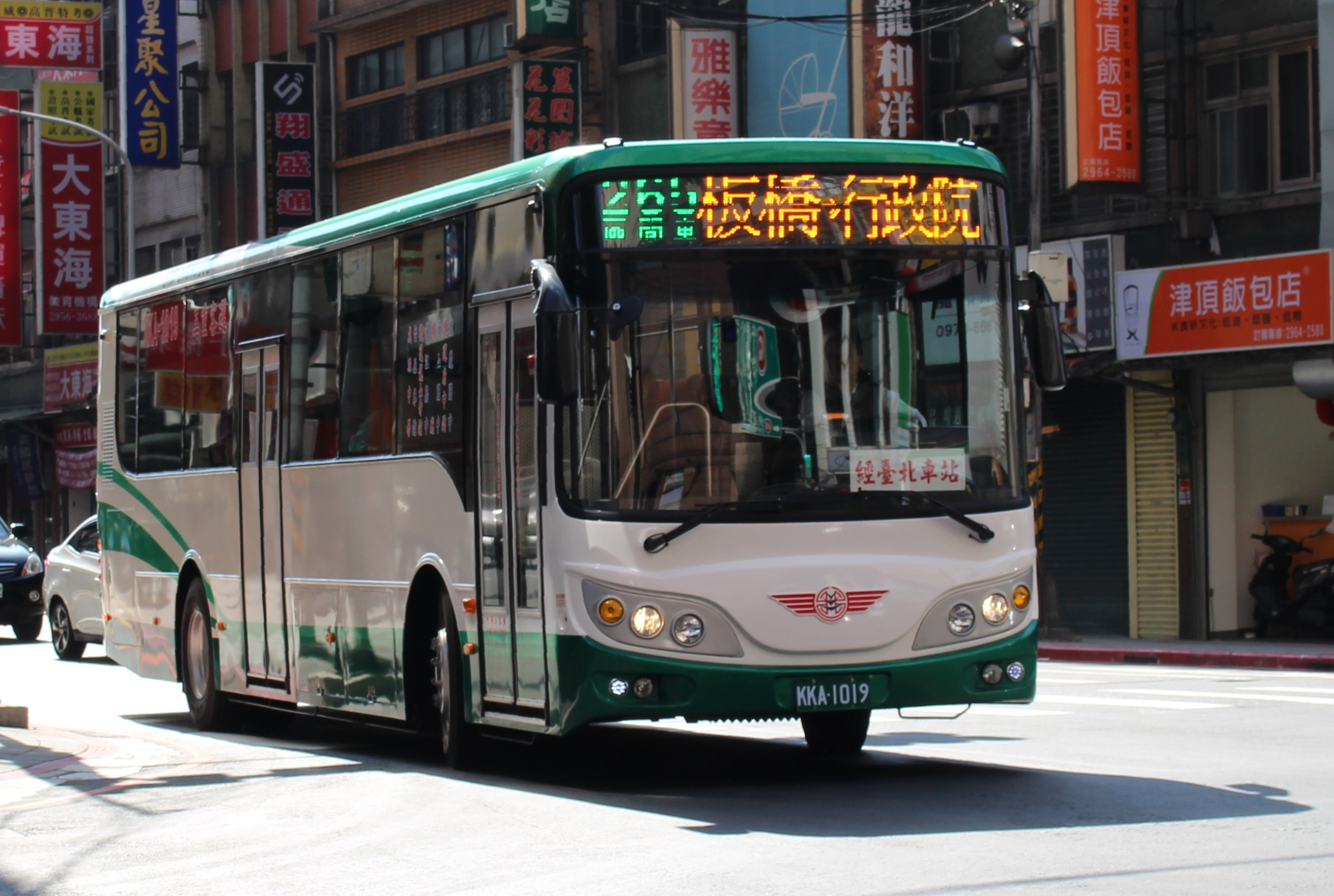 三重客運2016年HINO RK8JRVA-KJF雙門大客車KKA-1019